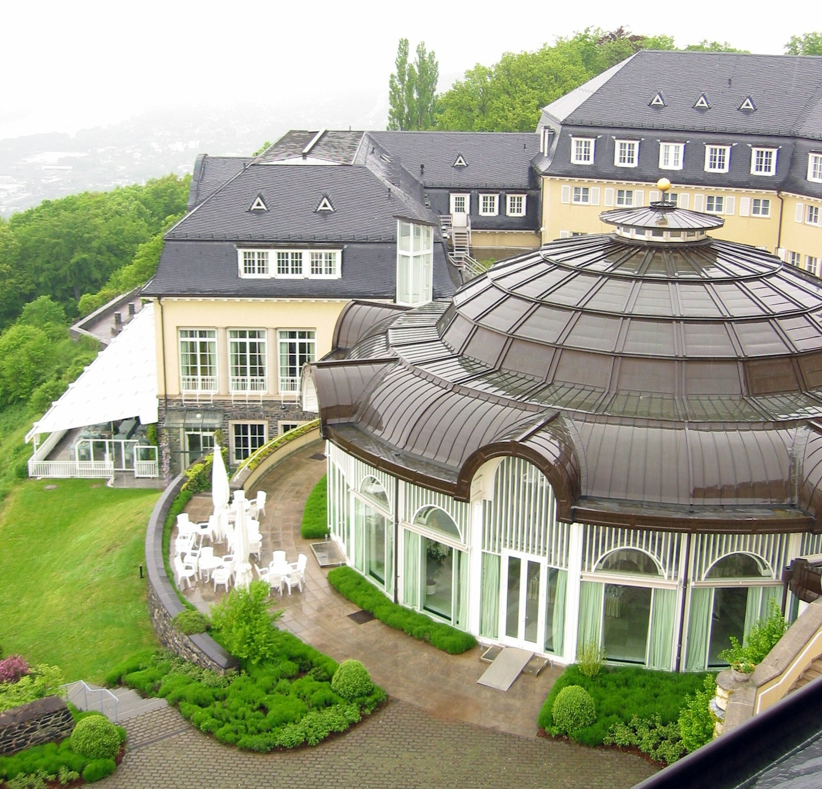 Rotunde des Hotels auf dem Petersberg